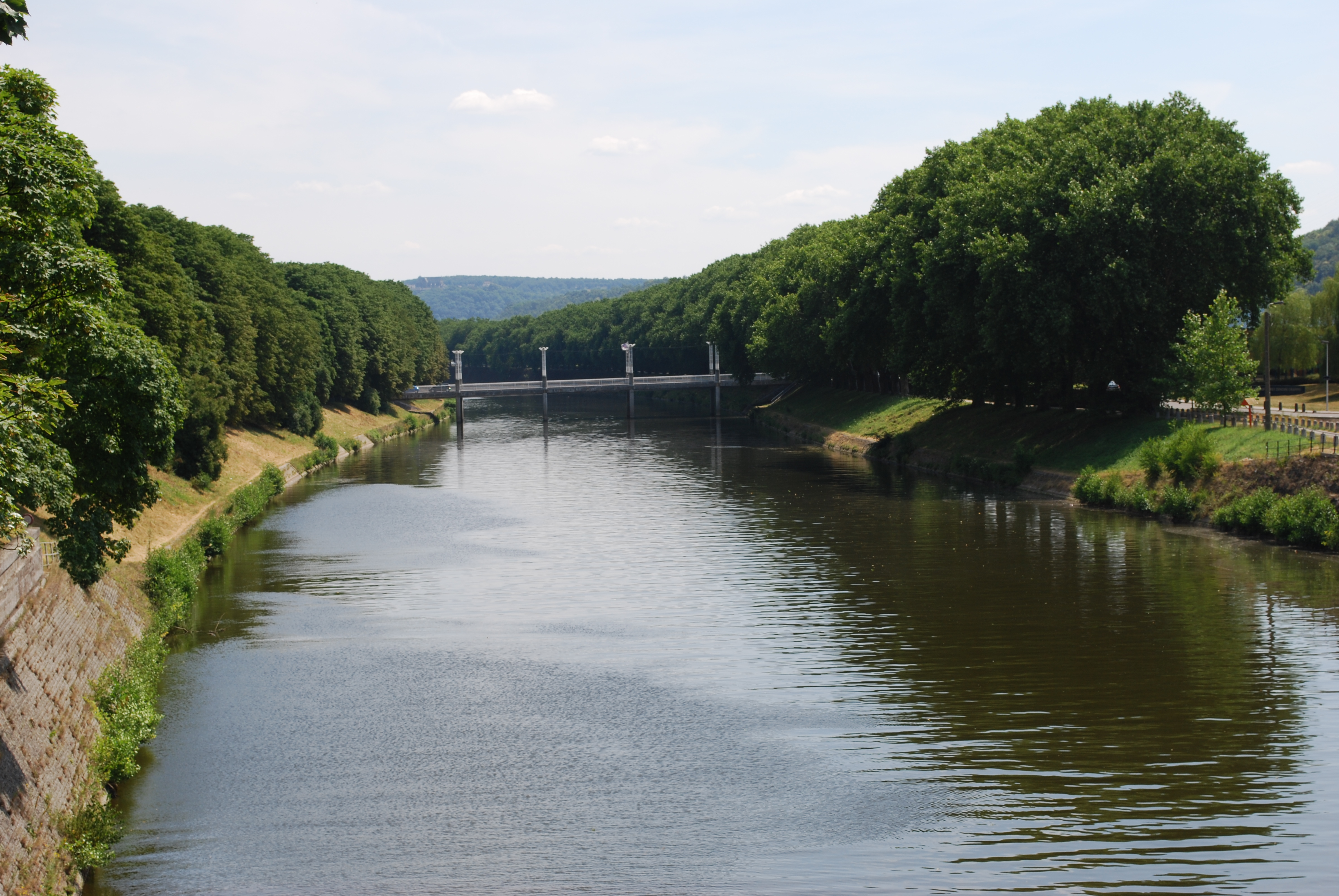 L'Ourthe à Liège, entre le quai des Ardennes et le quai des Vennes, et le pont de Belle-Ile.